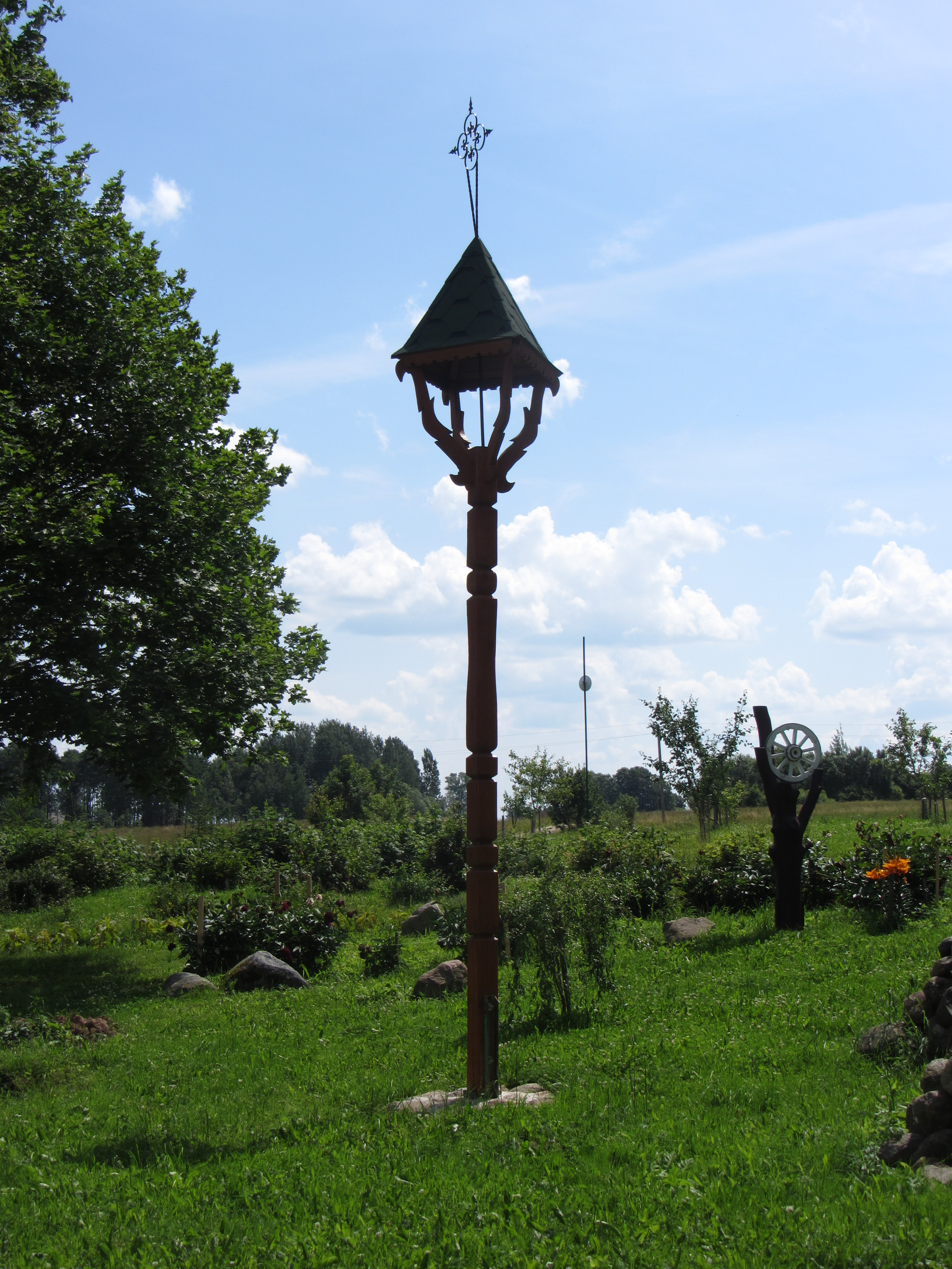 Dvarykščius 30258, Lithuania